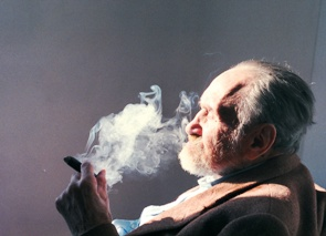 Anatols Imermanis. Riga, Buchdruckatelier „Baltais lācis“, Frühjahr 1997